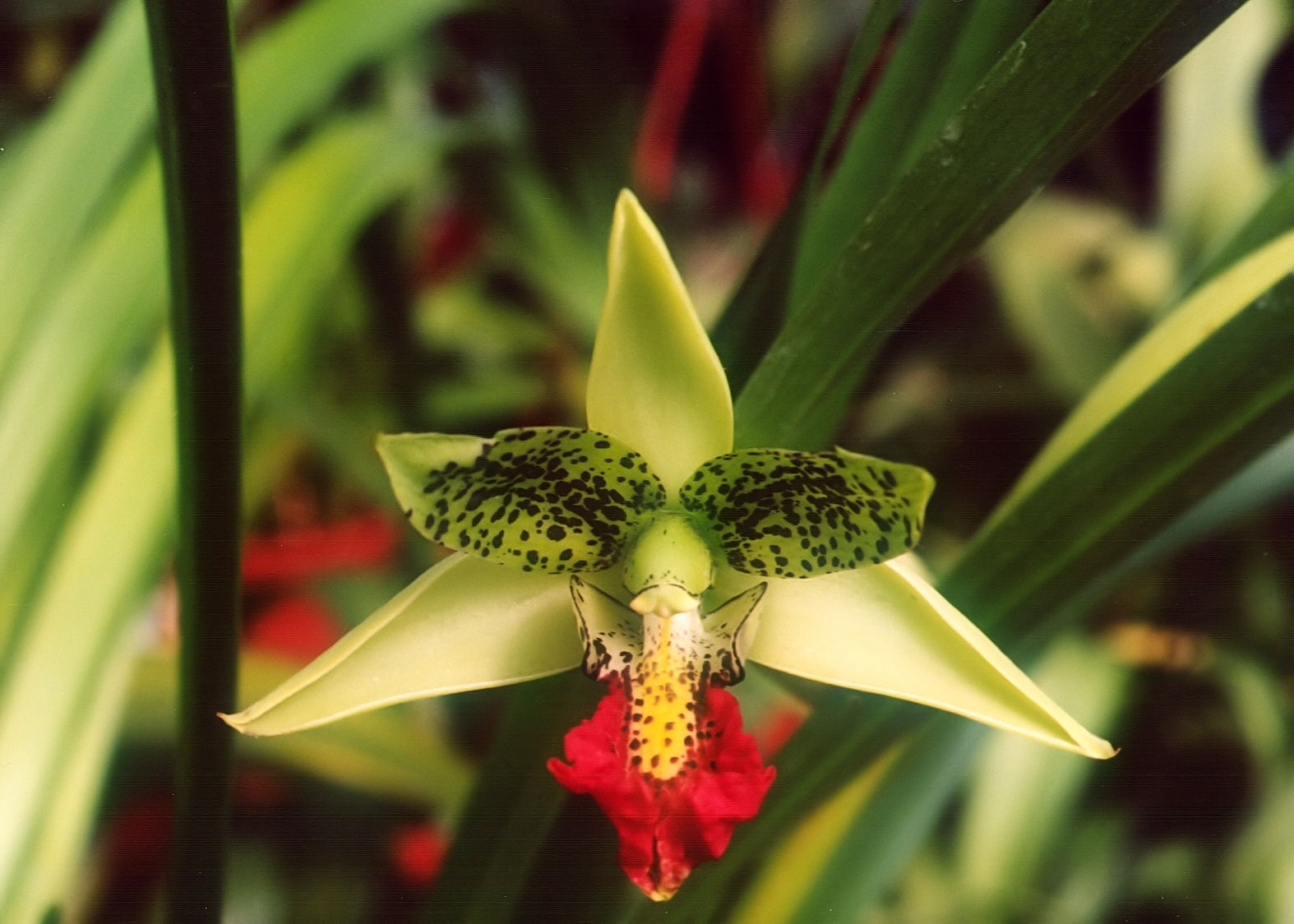 Cymbidiella rhodochila